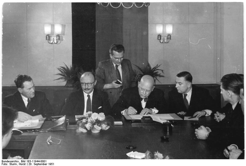 Abschluss eines Warenabkommens zwischen der DDR und Westdeutschland. Am 20.9.51 wurde in Berlin im Haus der Ministerien das Warenabkommen zwischen der DDR und Westdeutschland unterzeichnet. Das Abkommen, dass sofort in Kraft triff, sieht einen Warenaustausch in Höhe von je 550 Millionen VE (Verrechnungseinheiten) vor. UBz: Der Bevollmächtigte für den innerdeutschen Handel, Josef Orlopp, unterzeichnet.